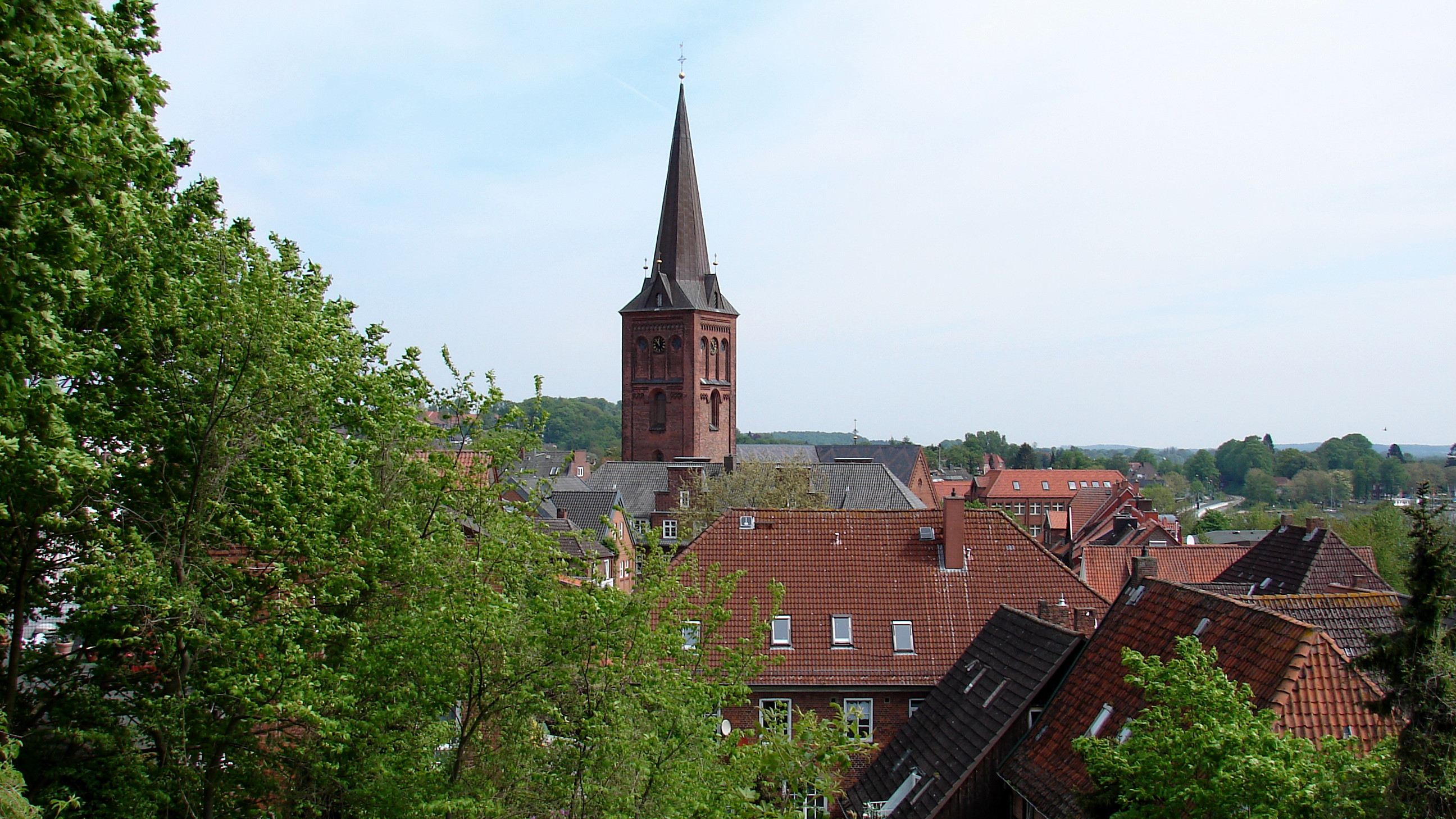 Plön, selbstfotografiert von Benutzer:Filzstift, Sommer 2004